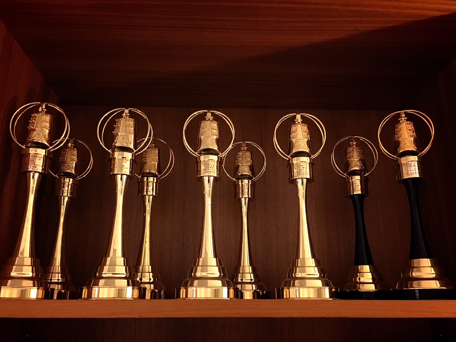 王淑娟歷年榮獲獎項